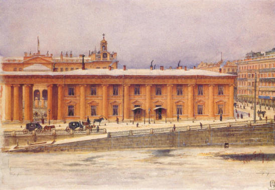 Аничков дворец. Кабинет Его Величества. Акварель Н.К.Бооля. 1894